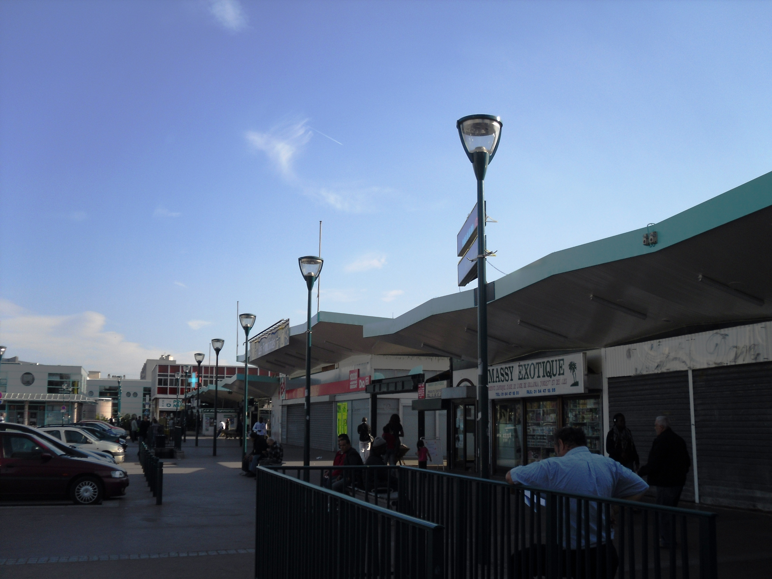 Les Franciades à Massy (91)